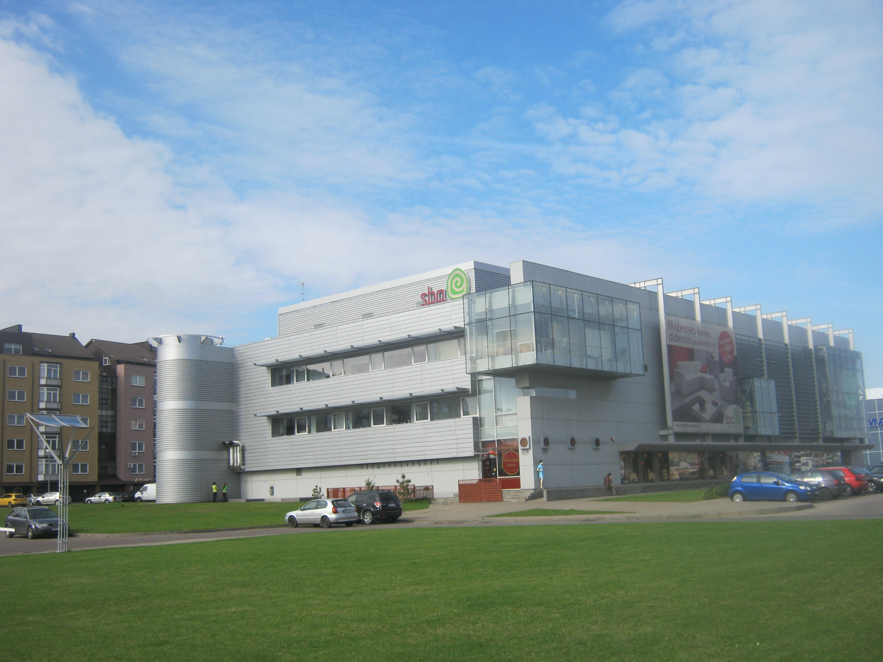 Vilnius